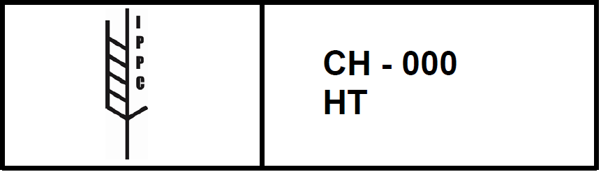 NIMP n° 15 - Directives pour la réglementation de matériaux d’emballage à base de bois dans le commerce international, cf. Marque la plus utilisée en Suisse Extrait du PDF tel que montré.